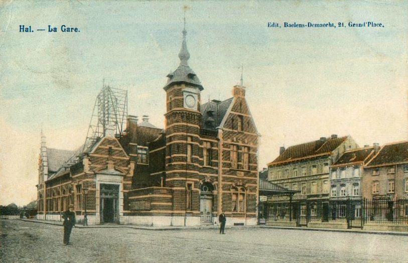 Dit is een foto van een postkaart uit de 19e eeuw of begin 20e eeuw. Ik ga ervan uit dat de fotograaf overleden is.